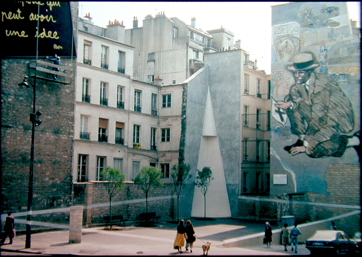 Un carré pour un square (Place Fréhel) vue générale